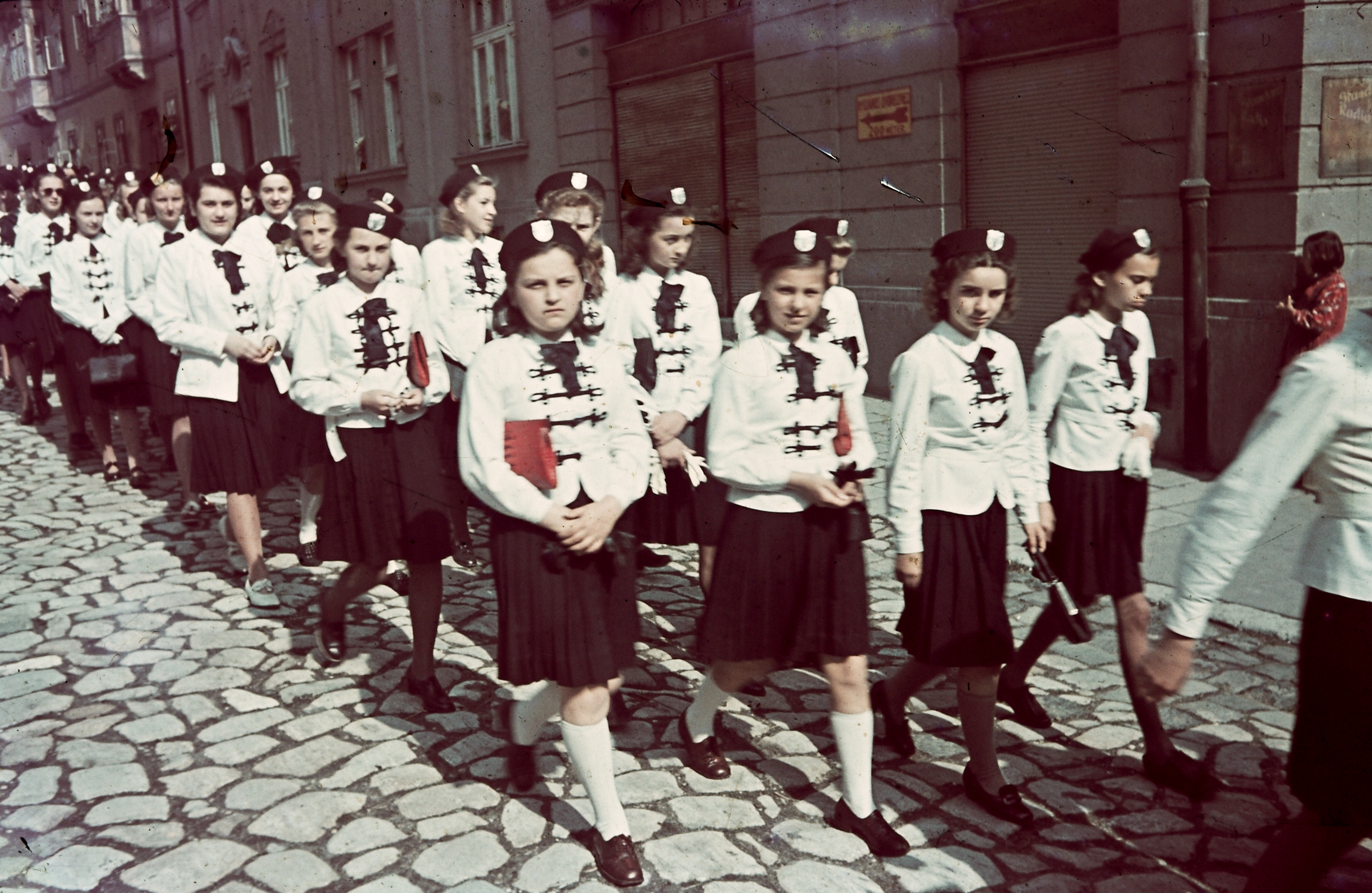 Káptalandomb, Szent László napi körmenet a Gutenberg tér felől nézve. Location: Hungary, Győr Tags: procession, colorful, girls, uniform Title: Káptalandomb, Szent László napi körmenet a Gutenberg tér felől nézve.